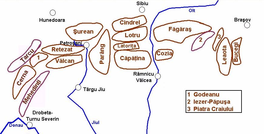 Gliederung der Transsilvanischen Alpen